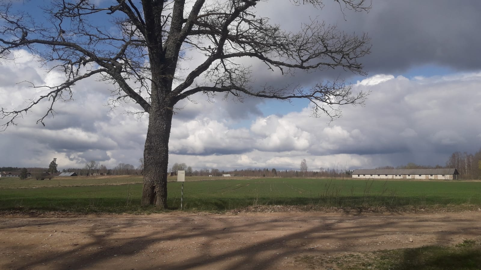 Attēlā redzama apdzīvotā vieta Ķemere, Ēveles pagastā, Burtnieku novadā.